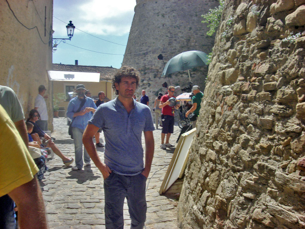 L'attore italiano Alessandro Siani sul set del film Benvenuti al Nord di Luca Miniero, nei pressi del Castello dell'Abate a Castellabate (Salerno).